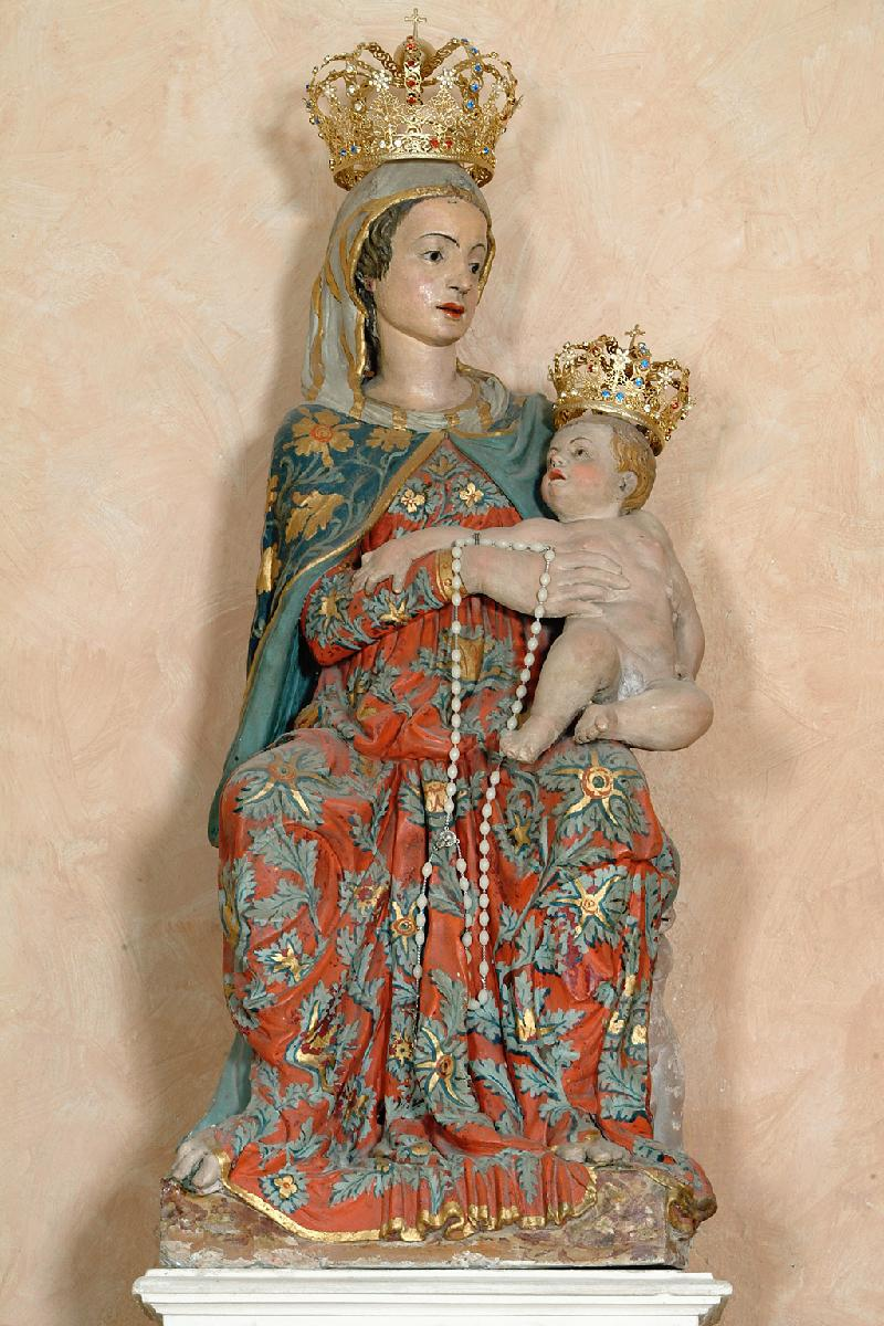 INFORMAZIONI SUL BENE Tipologia scultura Misure cm 117.0x52.0x40.0 (HxLxP) Datazione secolo XV (1419 - 1435) Autore Nanni di Bartolo, bottega veneta Materia e tecnica terracotta dipinta Soggetto Madonna con Gesù Bambino FONTE Inventario dei beni storici e artistici della diocesi di Padova